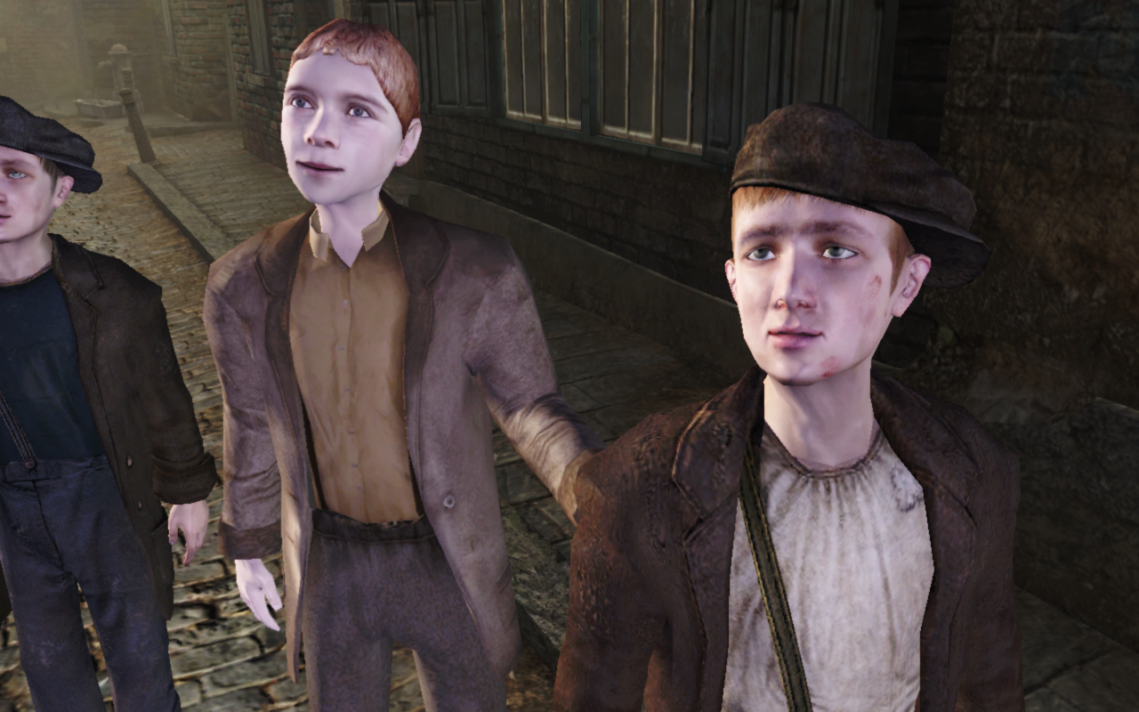 Capture d'écran du jeu Sherlock Holmes contre Jack l'Éventreur. Ces jeunes garçons sont les fameux Baker Street Irregulars, qui aident fréquemment le détective dans ses enquêtes.